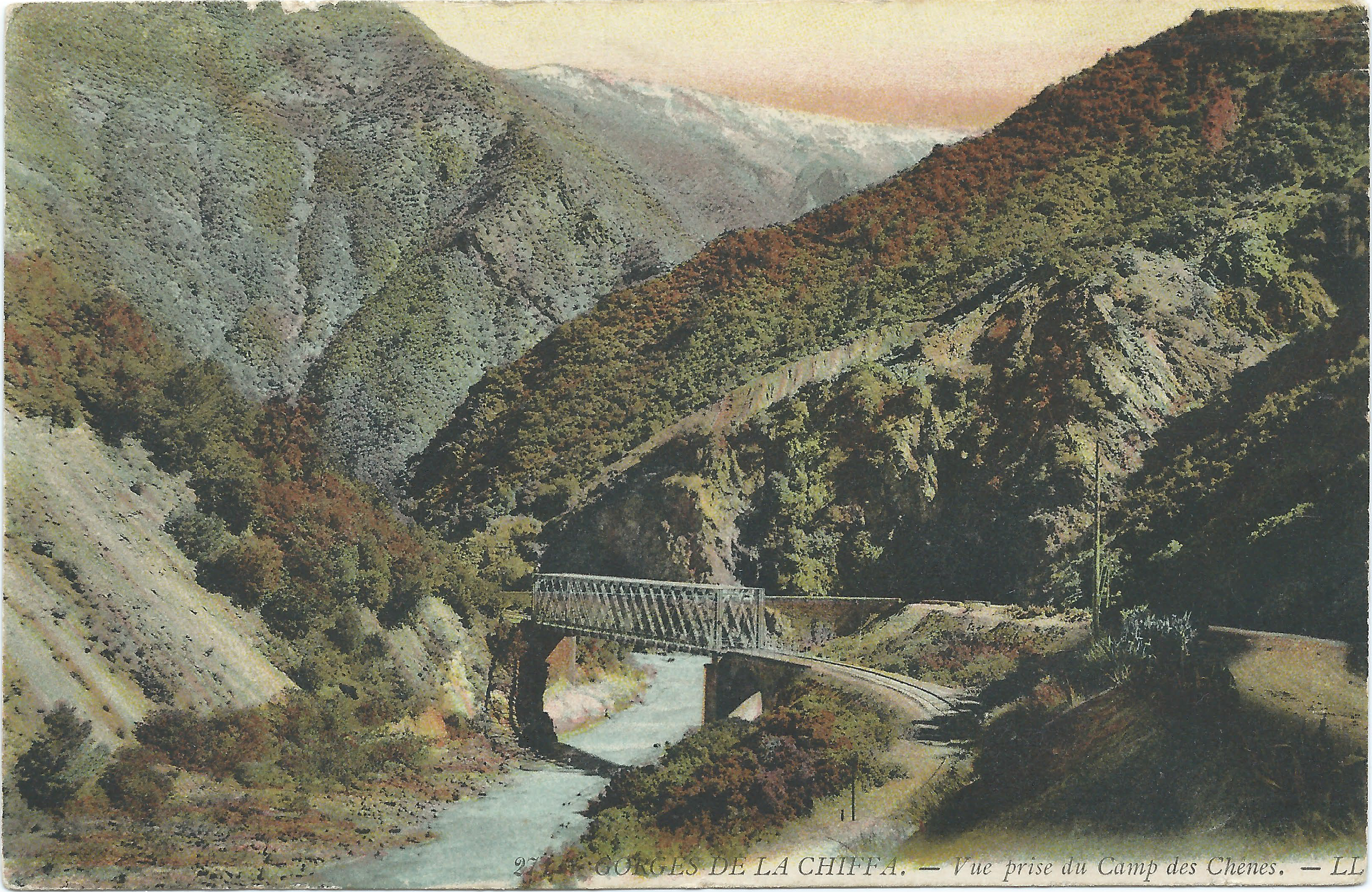 Algerije briefkaart van de Chiffa ravijn. De nu opgeheven spoorweg van Blida naar Djelfa.